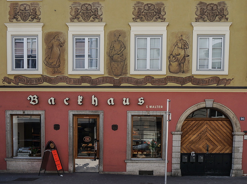 Bäckerei Backhaus in Klagenfurt, 10. Oktoberstraße #16, Kärnten, mit der Inschrift: "Das beste was der Mensch genießt ist wohl allezeit das weiße Brot, wo man einmal dies vermisst, da herrscht gewiss die größte Not!"